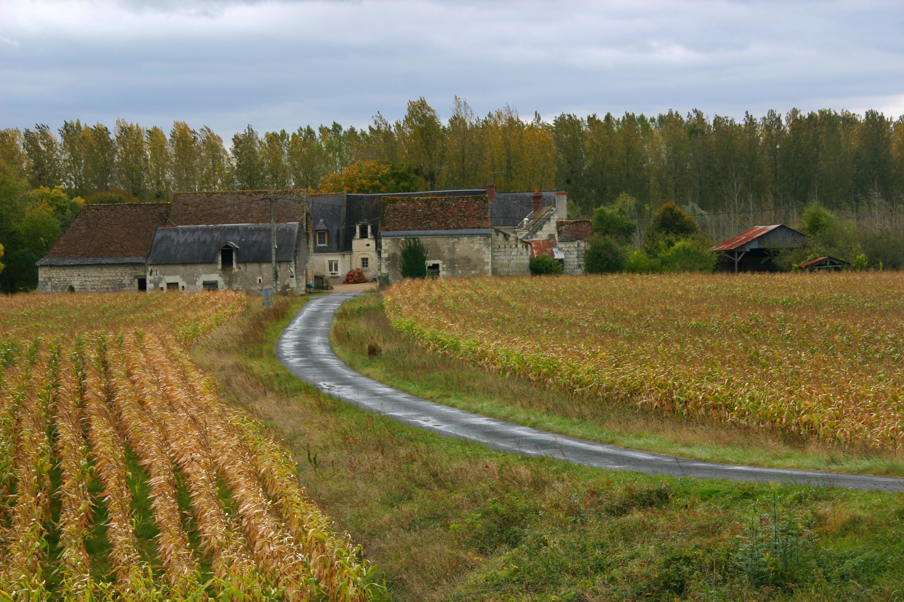 Bréhémont